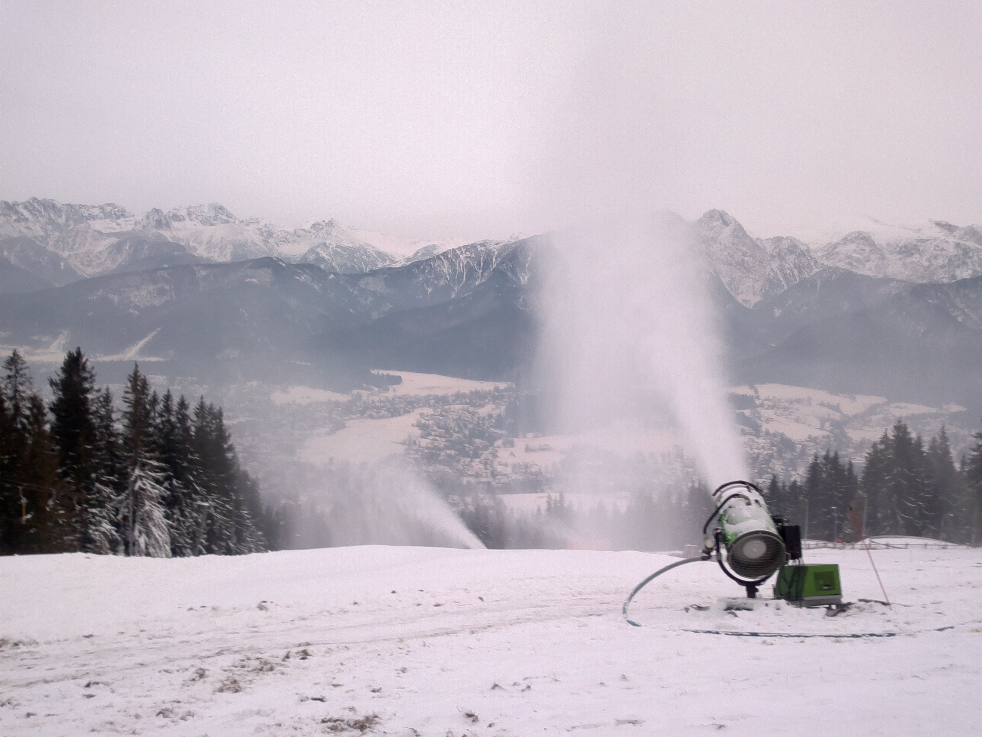 Widok na Tatry z Gubałówki